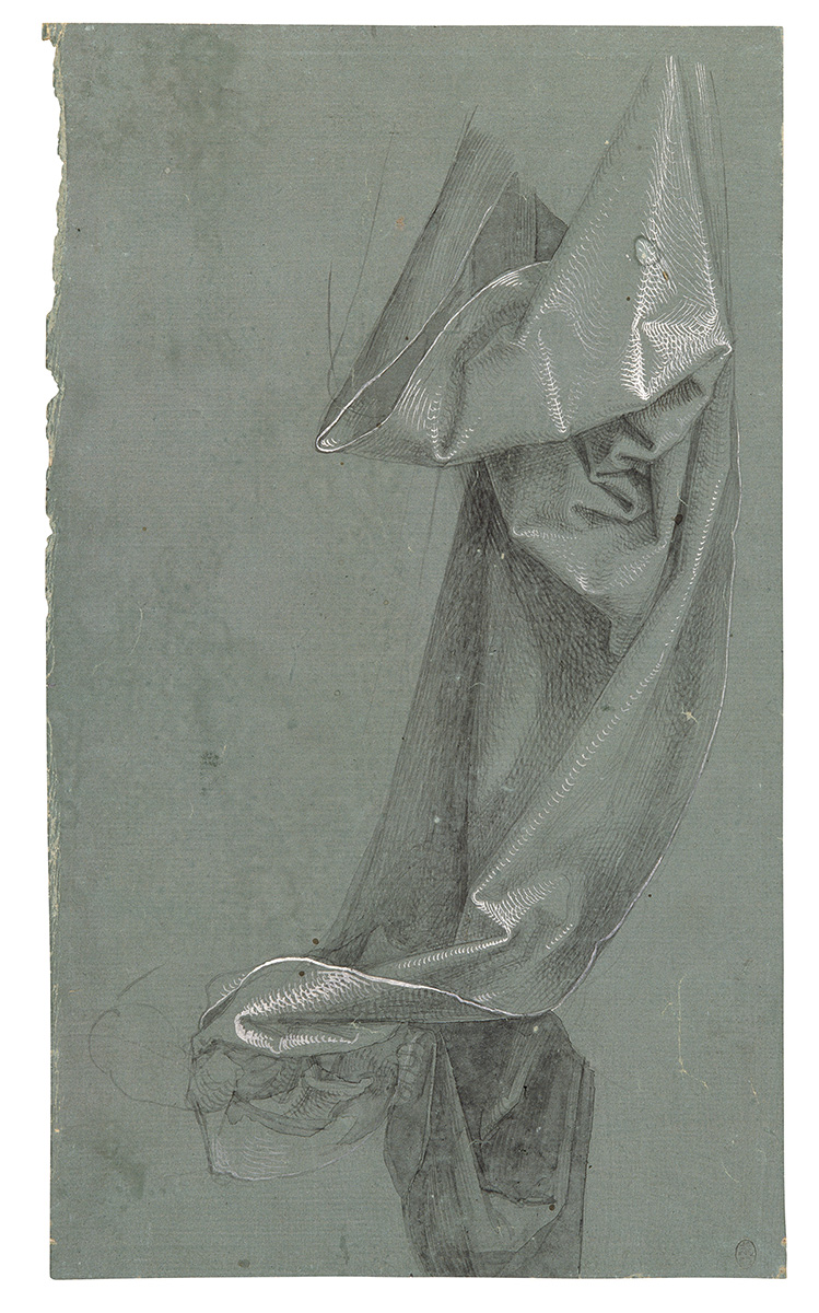 1508 Pinceau et encre de Chine, rehauts de blanc sur papier préparé vert foncé H. 23 ; L. 14 cm Don Melles Gruyer, 1946 Inv. 1946-20